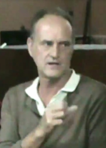 Conferencia de Sergio Millares Cantero.